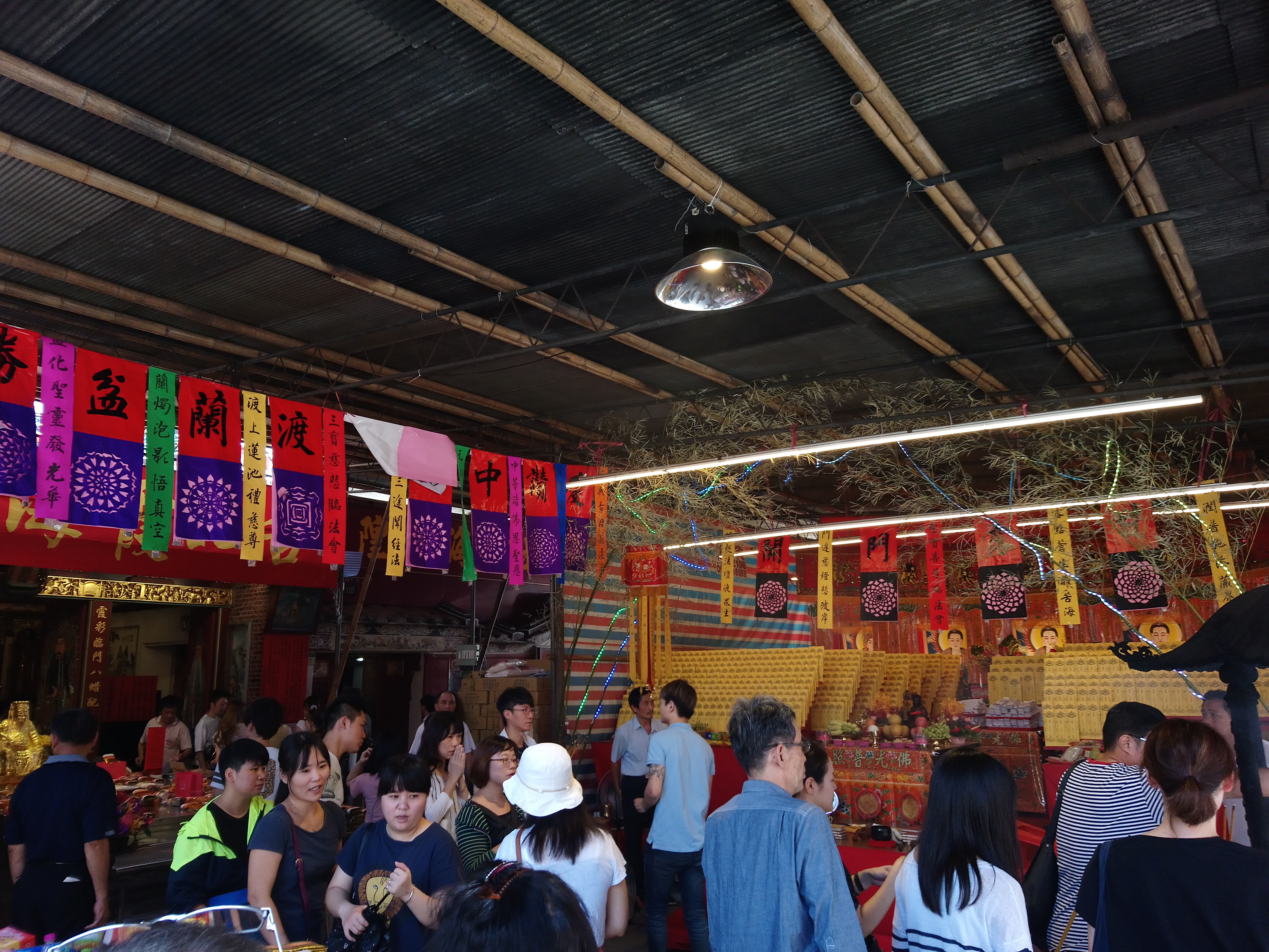 臺北霞海城隍廟盂蘭盆節法會,臺北市大同區延平次分區永樂里